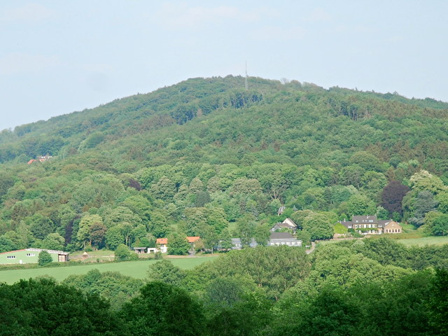 Blick vom Deipenbecker Weg in Wetter-Wengern übers Ruhrtal nach Osten zum Gut Obergedern (alter Middeldorps Hof) in Witten-Gedern. Über den bewaldeten Arenberg verläuft die Grenze zwischen Witten (Gemarkung Annen) und Herdecke (Gemarkung Ende): der nördliche (im Bild linke) Teil des Bergs gehört zu Witten, der südliche (rechte) Bereich zu Herdecke. Der abgebildete Bereich liegt (mit Ausnahme der Bäume im Vordergrund) im Landschaftsschutzgebiet „Wartenberg/Arenberg/Kalmerskopf/Im Schuppling“.